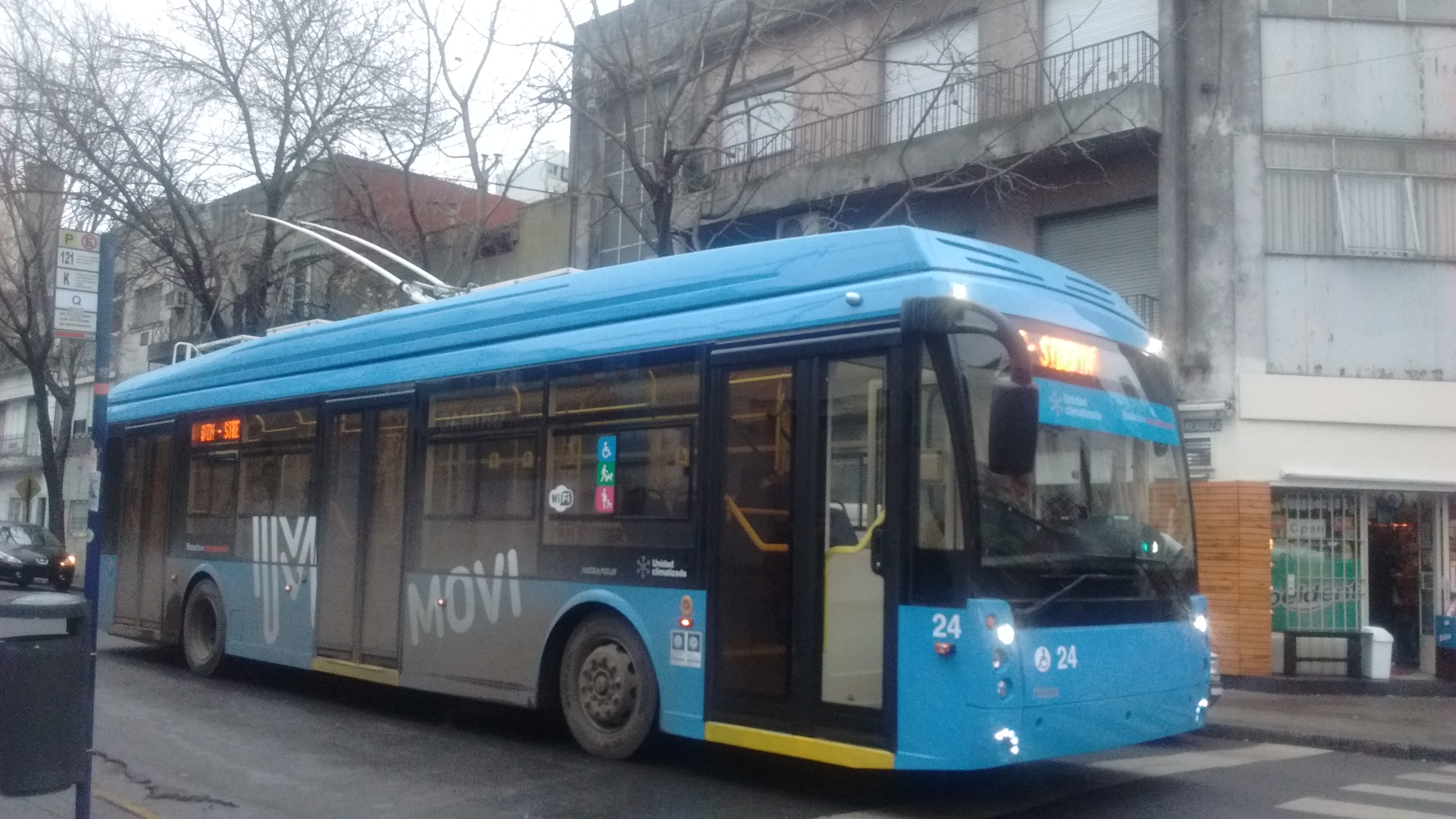 Coche Trolza Megapolis de la Línea Q de trolebuses rosarinos